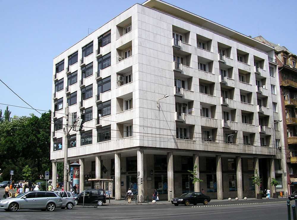 A building in Budapest, Hungary.